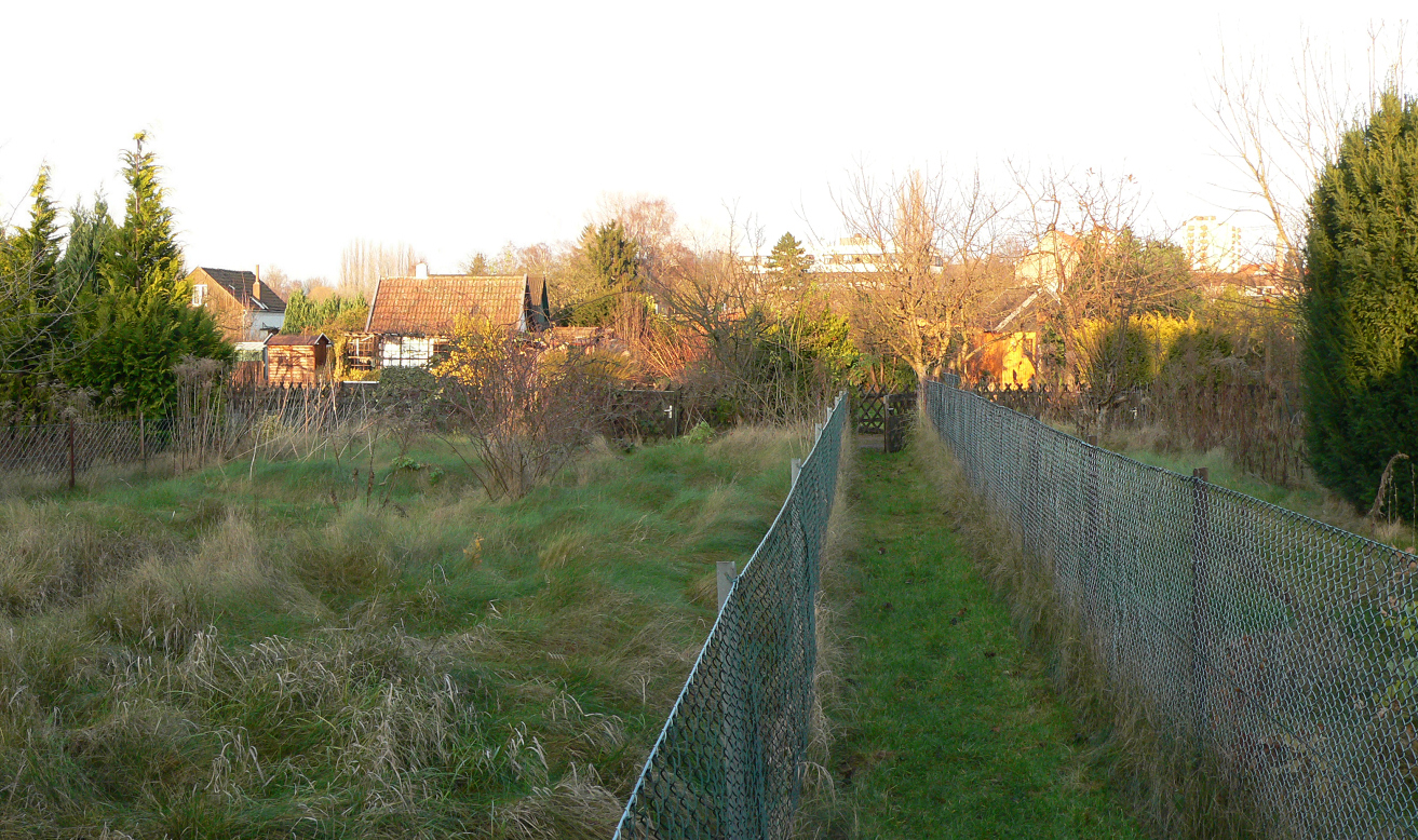 Leicht erhöhte Stelle in einer Kleingartenanlage in Burg in Hannover, vermutlicher Standort der Gernandesburg auf dem Wallberg als leichte Erhöhung